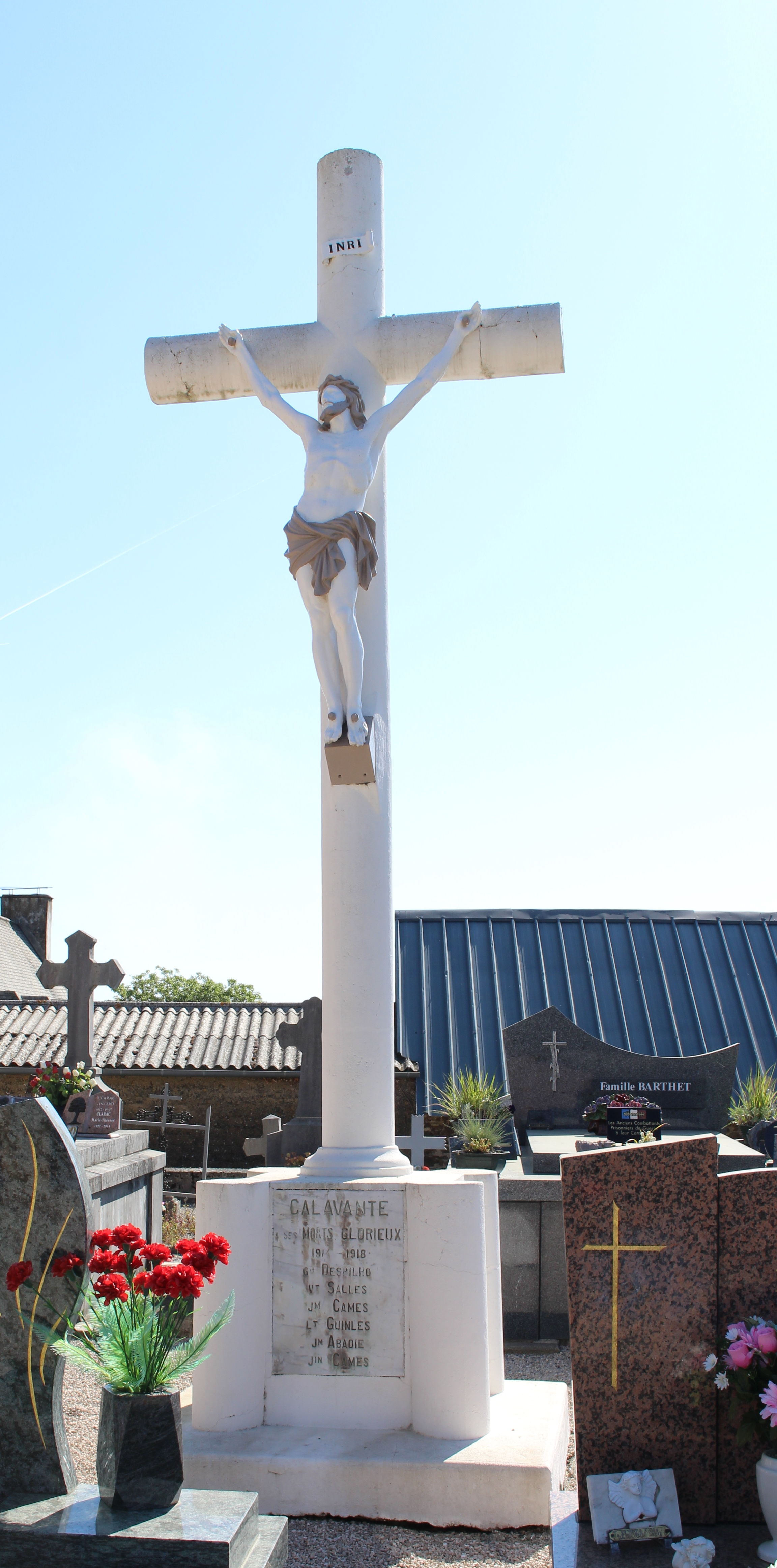 Monument aux morts de Calavanté (Hautes-Pyrénées)